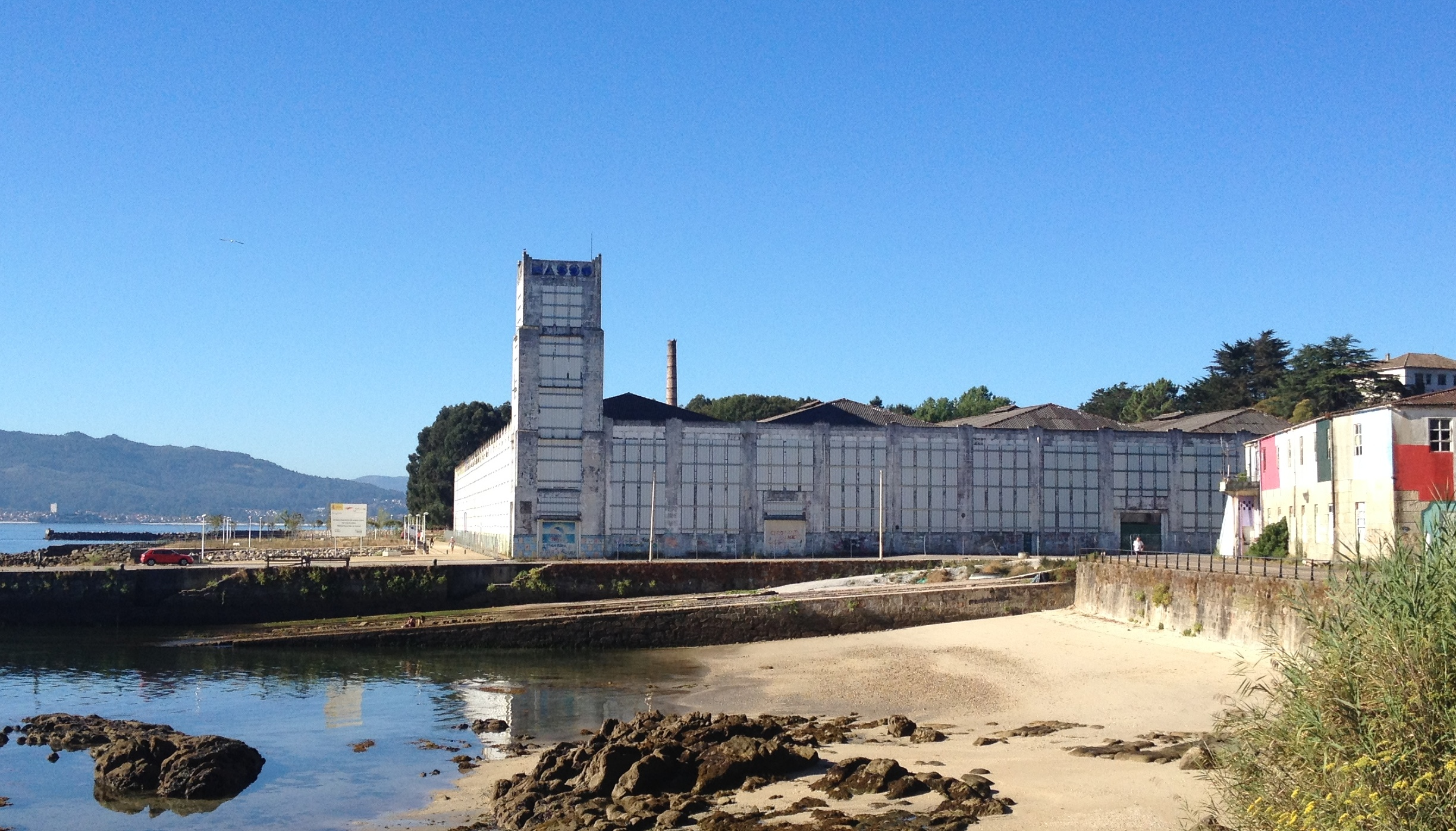 Planta de Massó en Cangas. Vista exterior